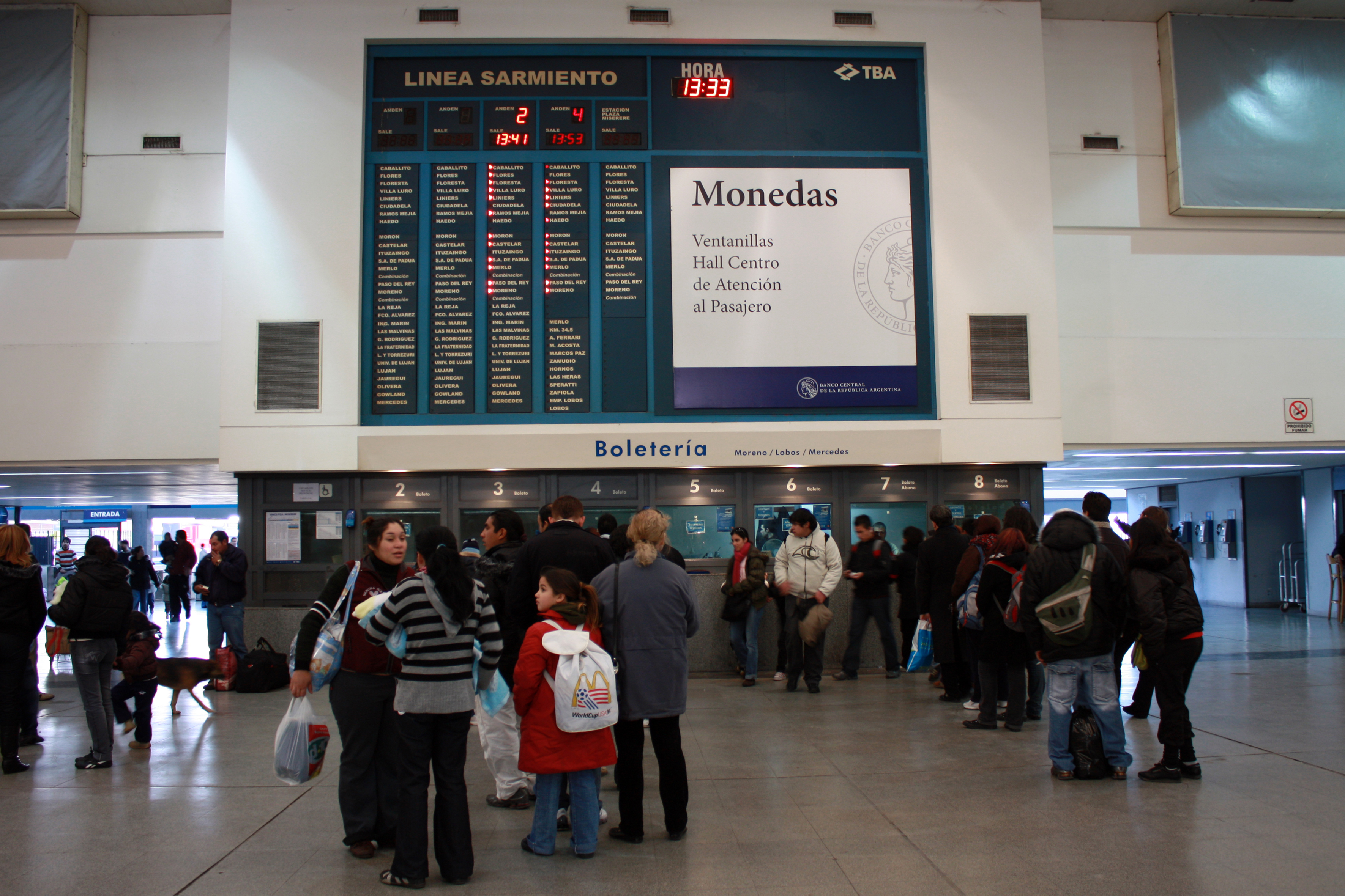 Boleterías de la estación Once - Plaza Miserere de la línea Sarmiento de ferrocarriles. Ciudad de Buenos Aires, Argentina